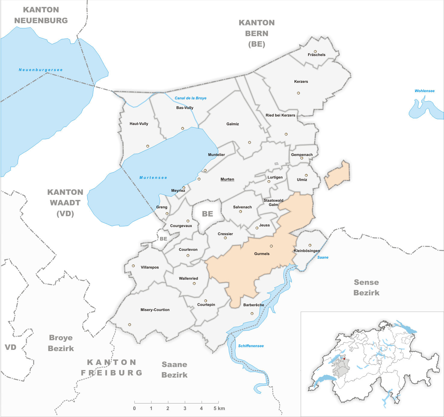 Municipality Gurmels